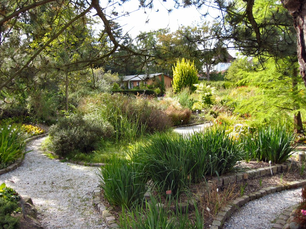 Wilhelmshaven, Botanischer Garten am alten Standort (bis 2015) in der Gökerstraße